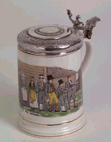 Krus mes søvlokk. Kruset er dekorert med "Brudefølge fra Søndmør" og er laget på Egersunds Fayancefanrik. Lokket er laget av Jacob Jensen Smidt, Strømsø (Drammen) i 1755. Foto Anne-Lise Reinsfelt, Norsk Folkemuseum, NF.1903-0177.